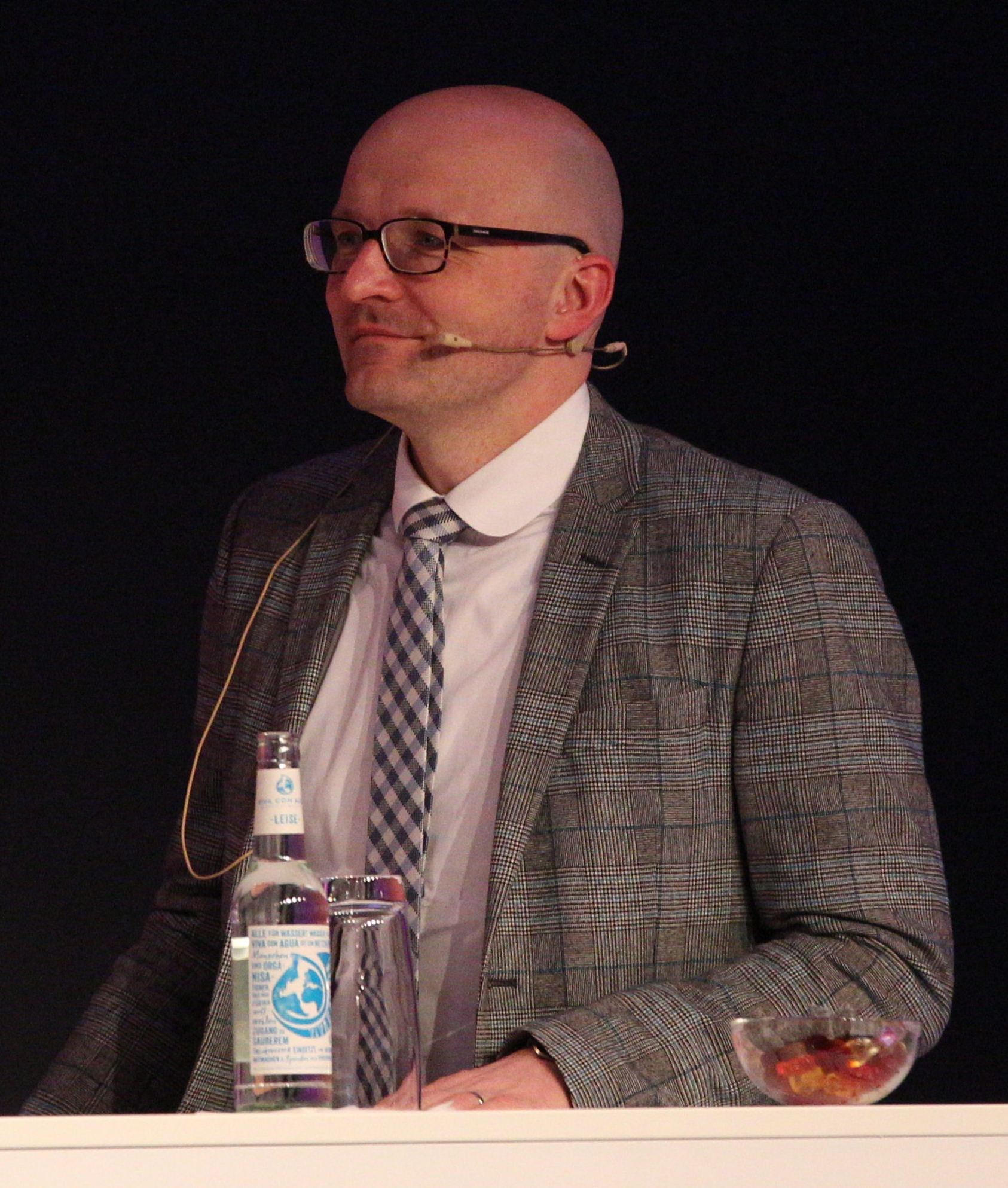 Thomas Kralinski (Bevollmächtigter des Landes Brandenburg beim Bund und für Medien) auf der re:publica 17